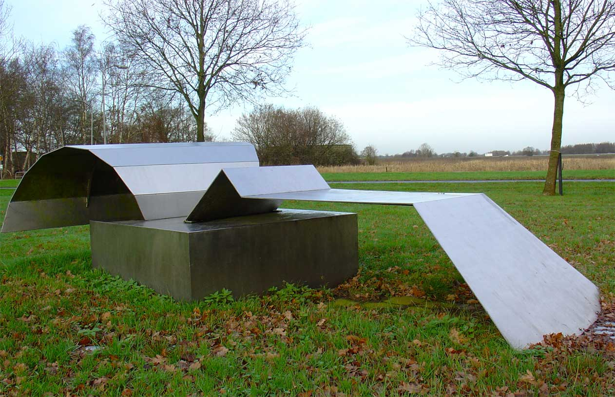 "Constructie 57" beeld van Dick van der Linden in Eemten, hoek Stapelerweg/Commissieweg